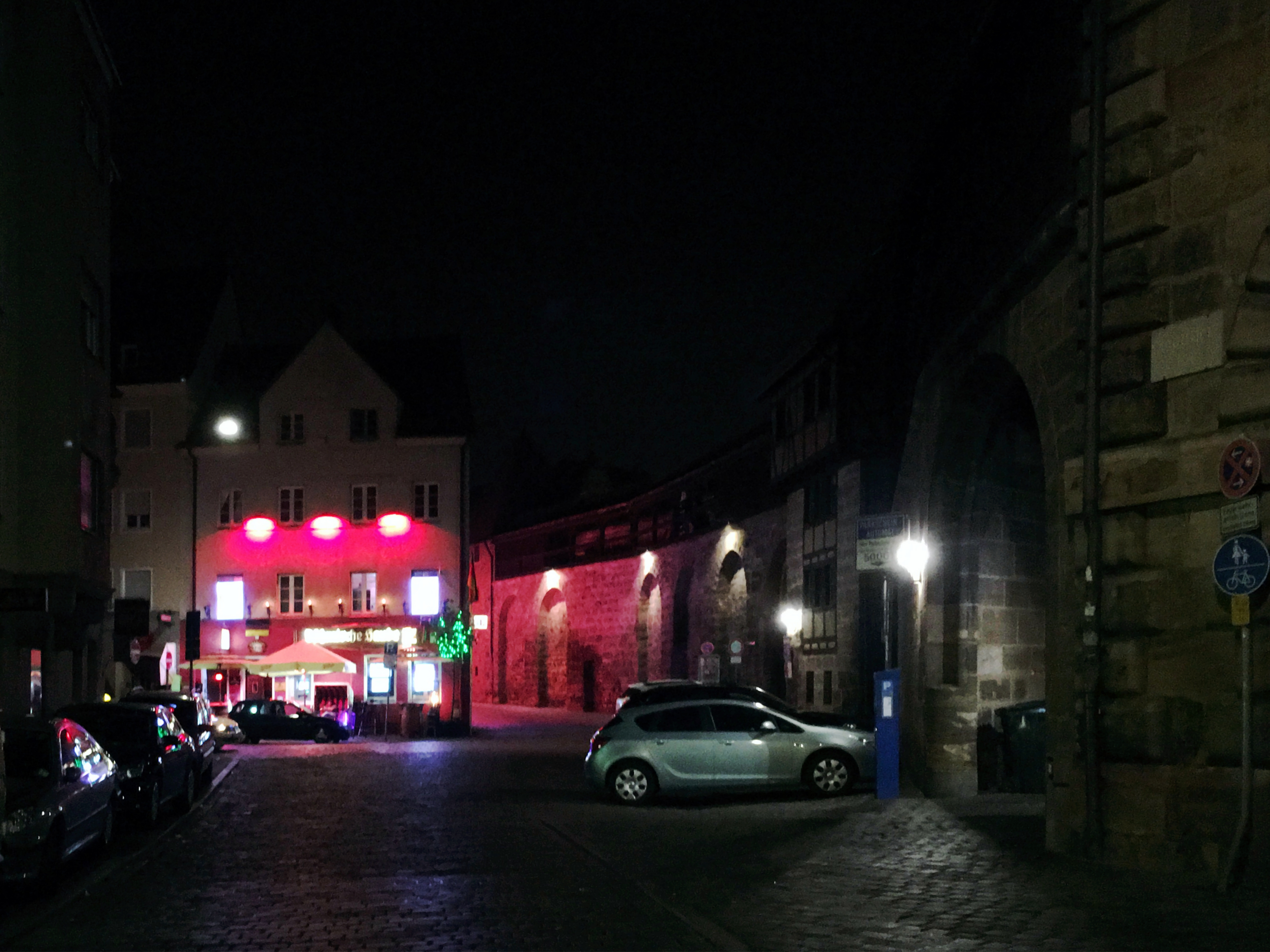 Eingang Frauentormauer Nürnberg